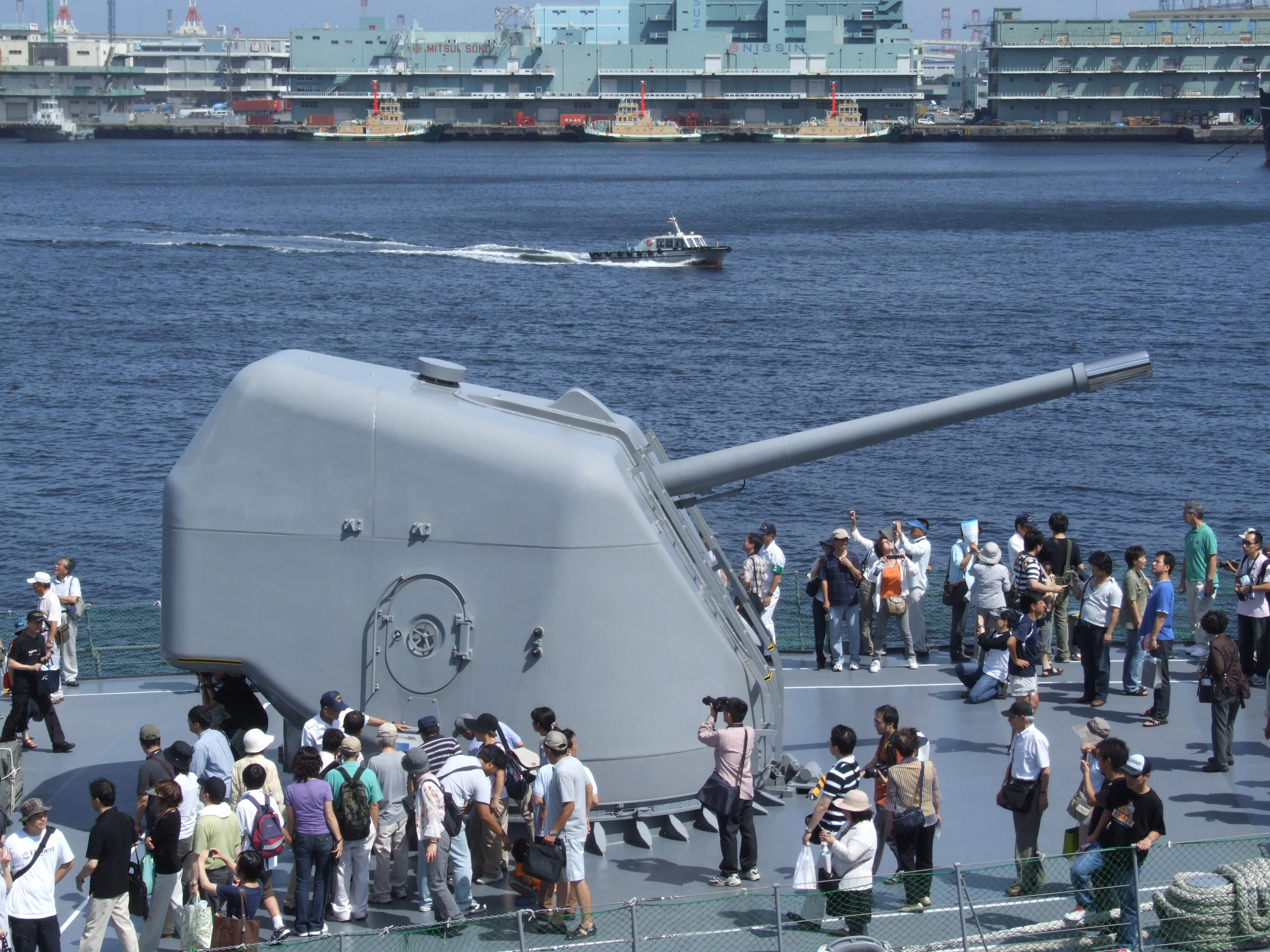 護衛艦きりしまのオートメラーラ127mm砲